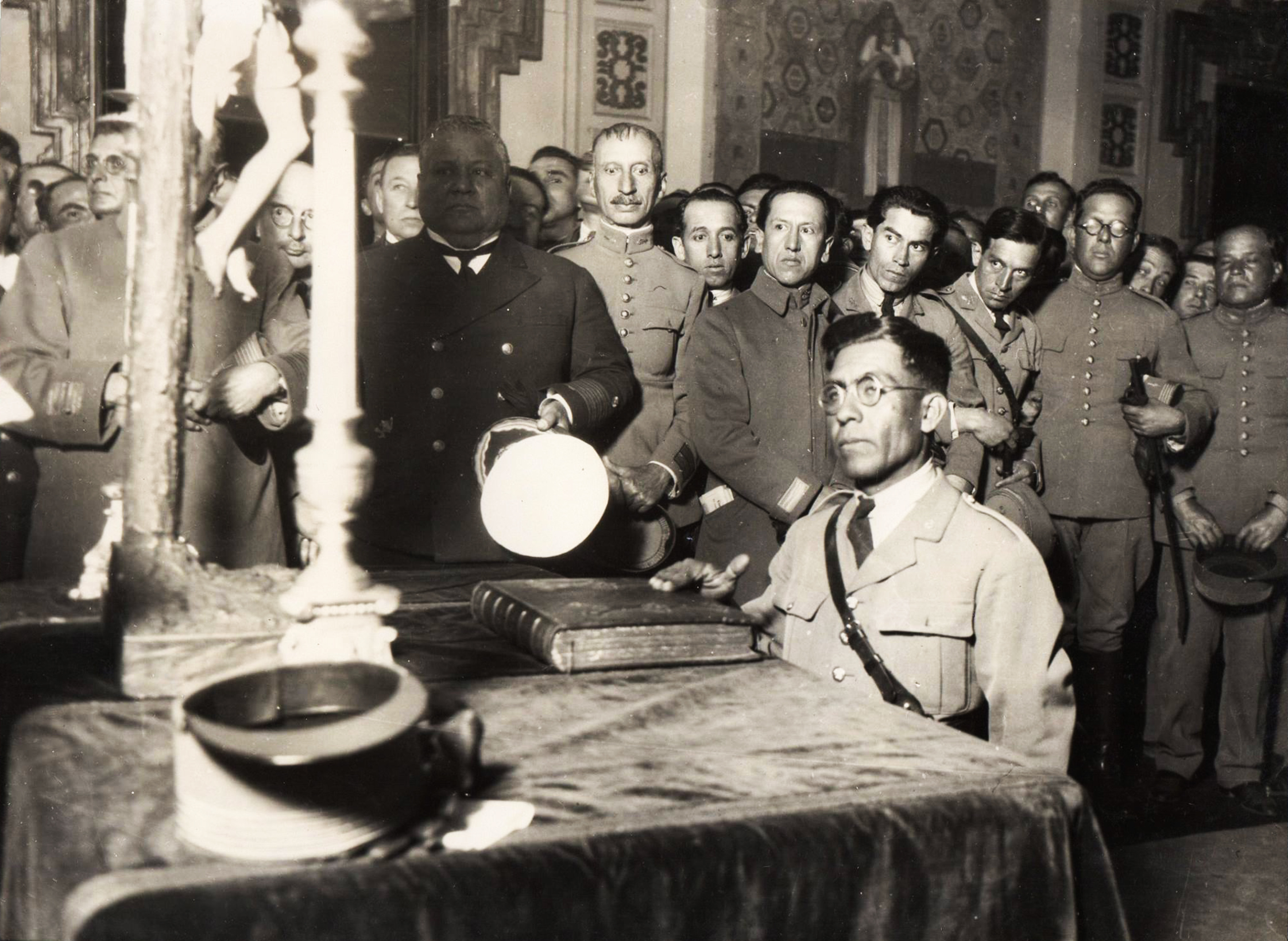 Juramentacion de coronel Sanchez Cerro (1930)